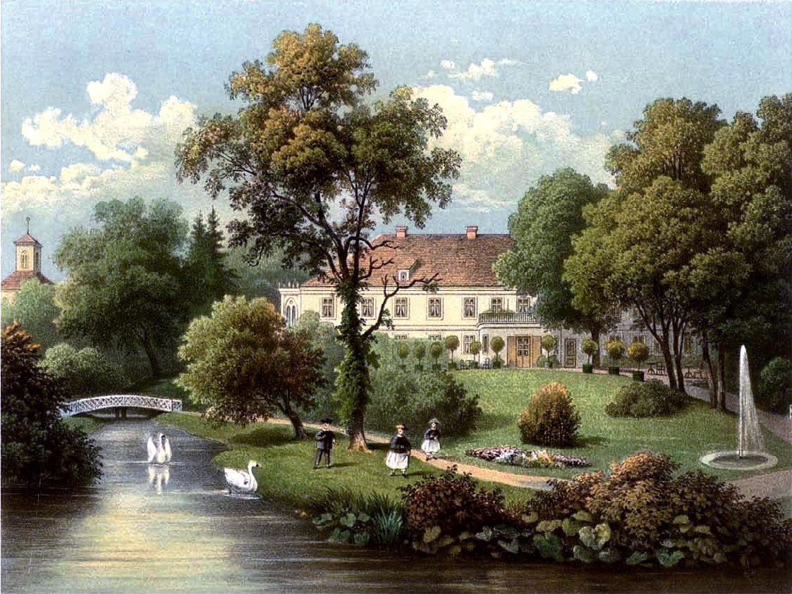 Rittergut Coseeger, Provinz Pommern